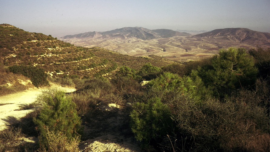 Monts des Beni-Chougrane, au sud de Sig (Algérie, atlas tellien). Photo prise fin 1973. De jeunes plantations de Pins sont visibles sur les banquettes aménagées dans les collines.